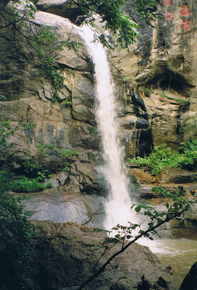 北京市郊雾灵山